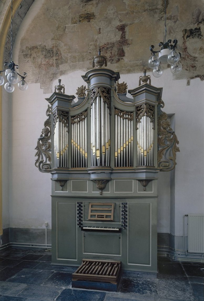 Cellebroedersklooster: Interieur, aanzicht orgel, orgelnummer 919 (opmerking: Gefotografeerd voor Het Historische Orgel in Nederland 1790-1818)